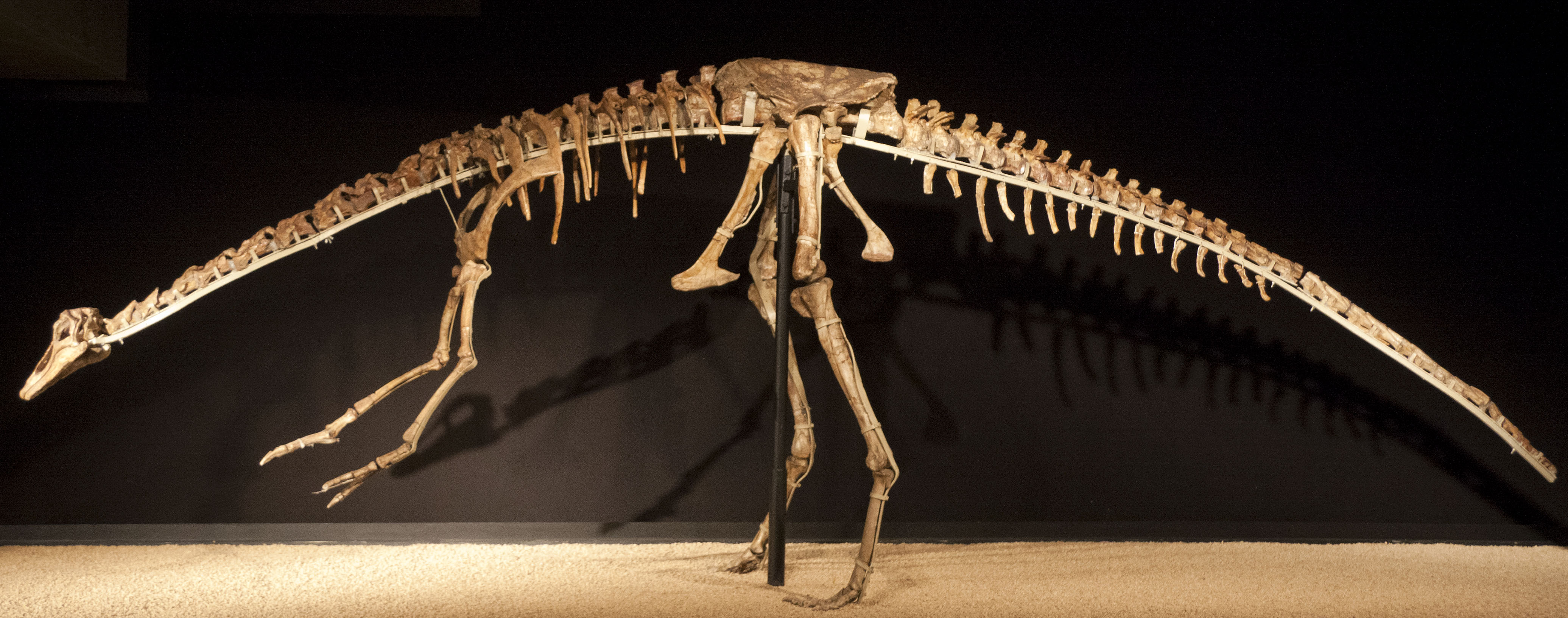 IMG_1232'